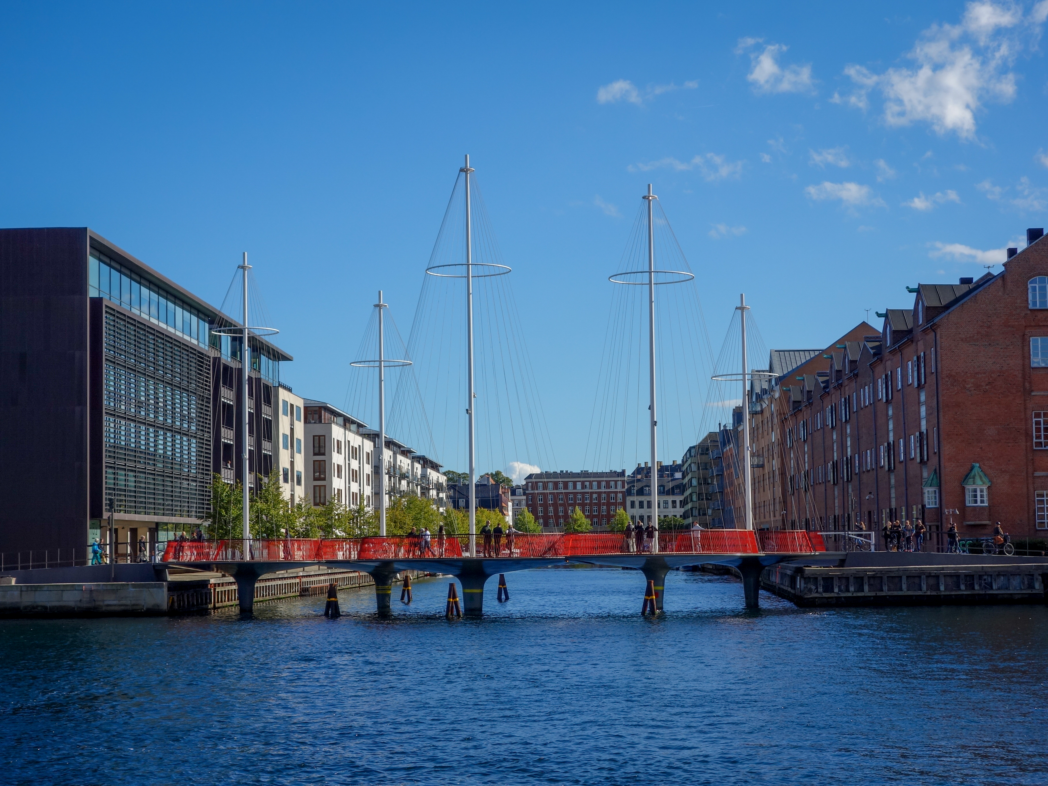 Cirkelbroen in Copenhagen, Denmark